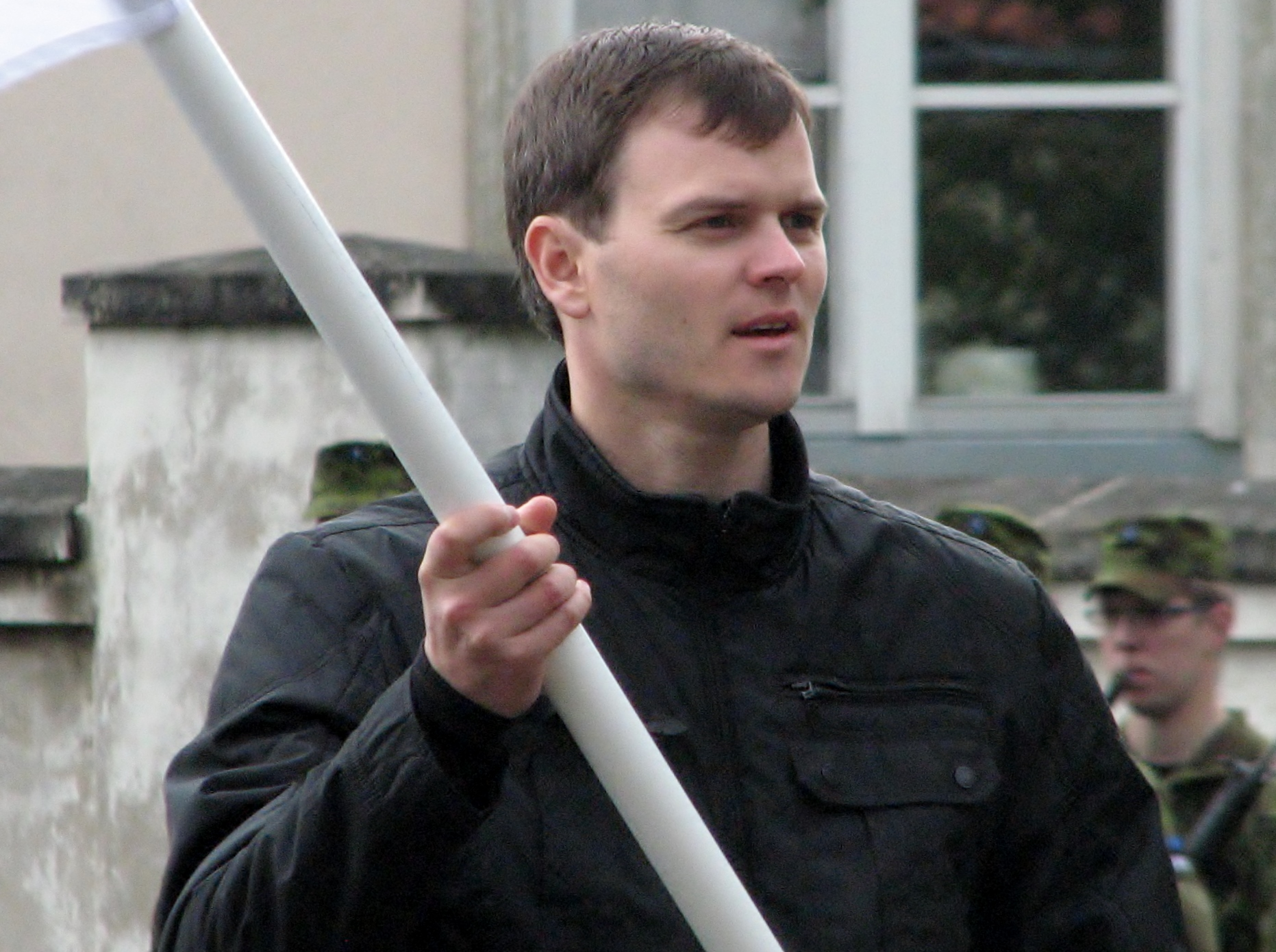 Madis Kallas Kuressaare Eesti Vabadussõjas langenute mälestussamba juures Võidupüha kõnekoosolekul